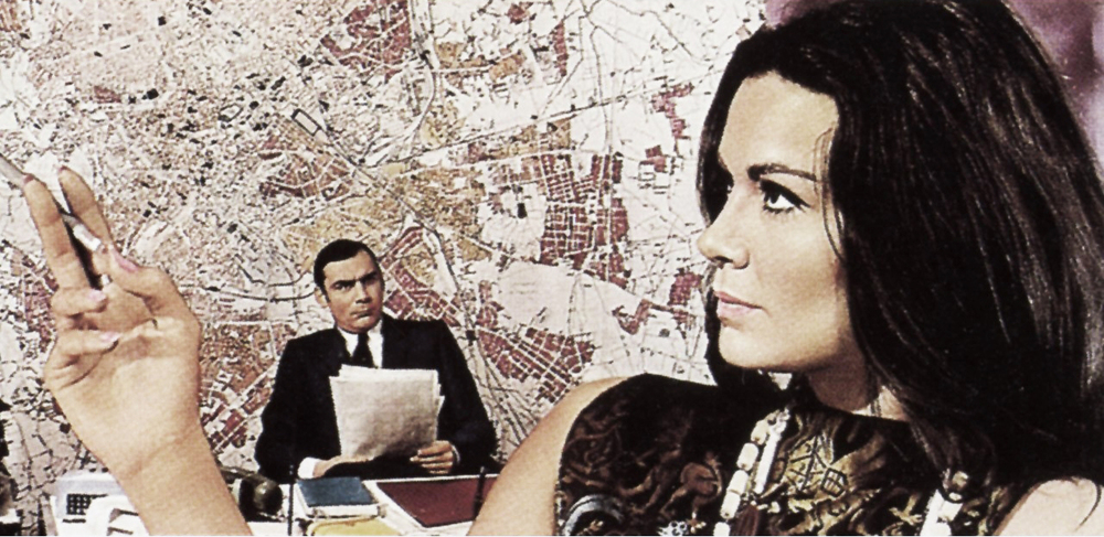 Una scena del film Indagine su un cittadino al di sopra di ogni sospetto